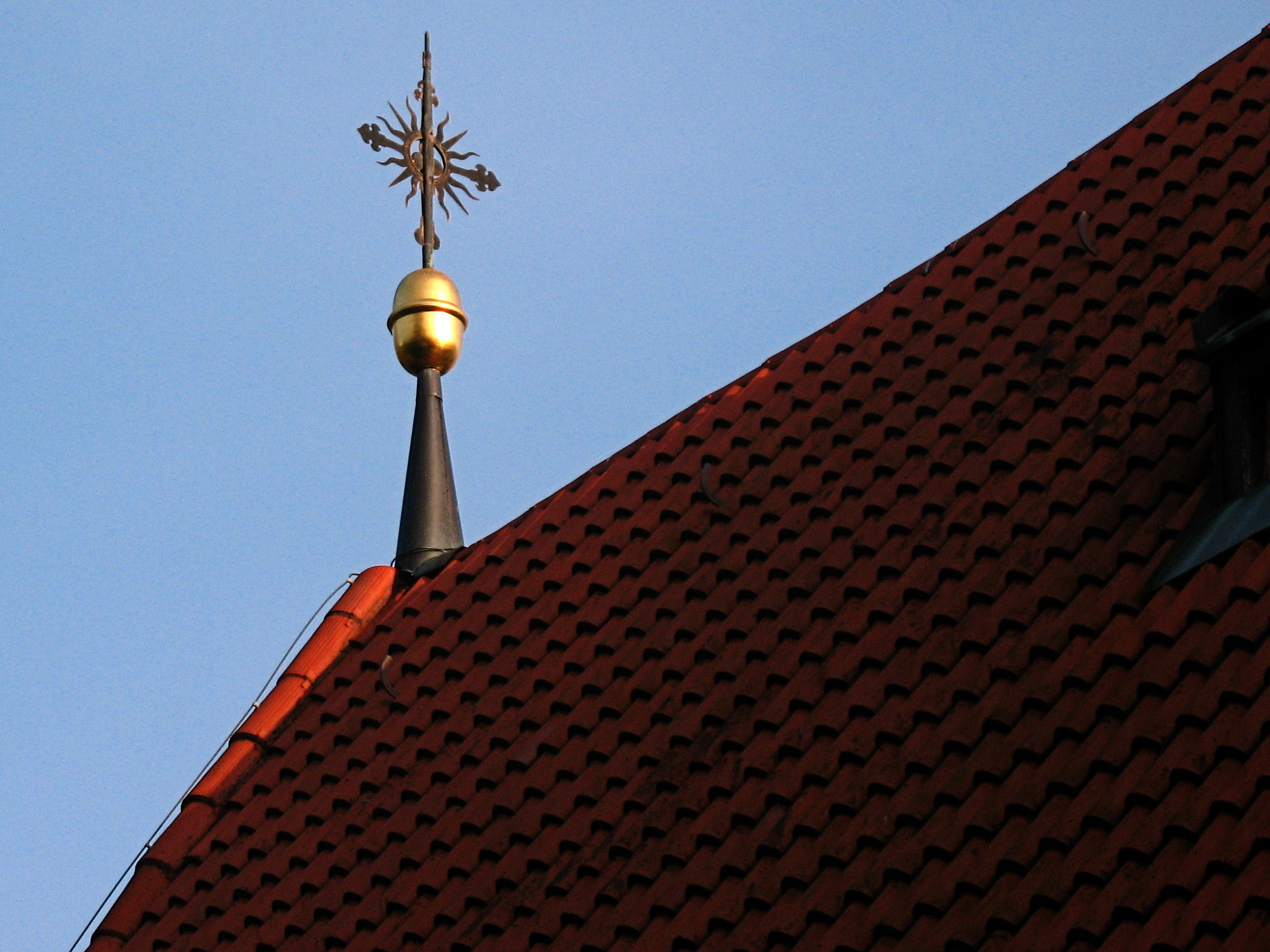 Turmkugel von St. Nikolas am Gasteig in München